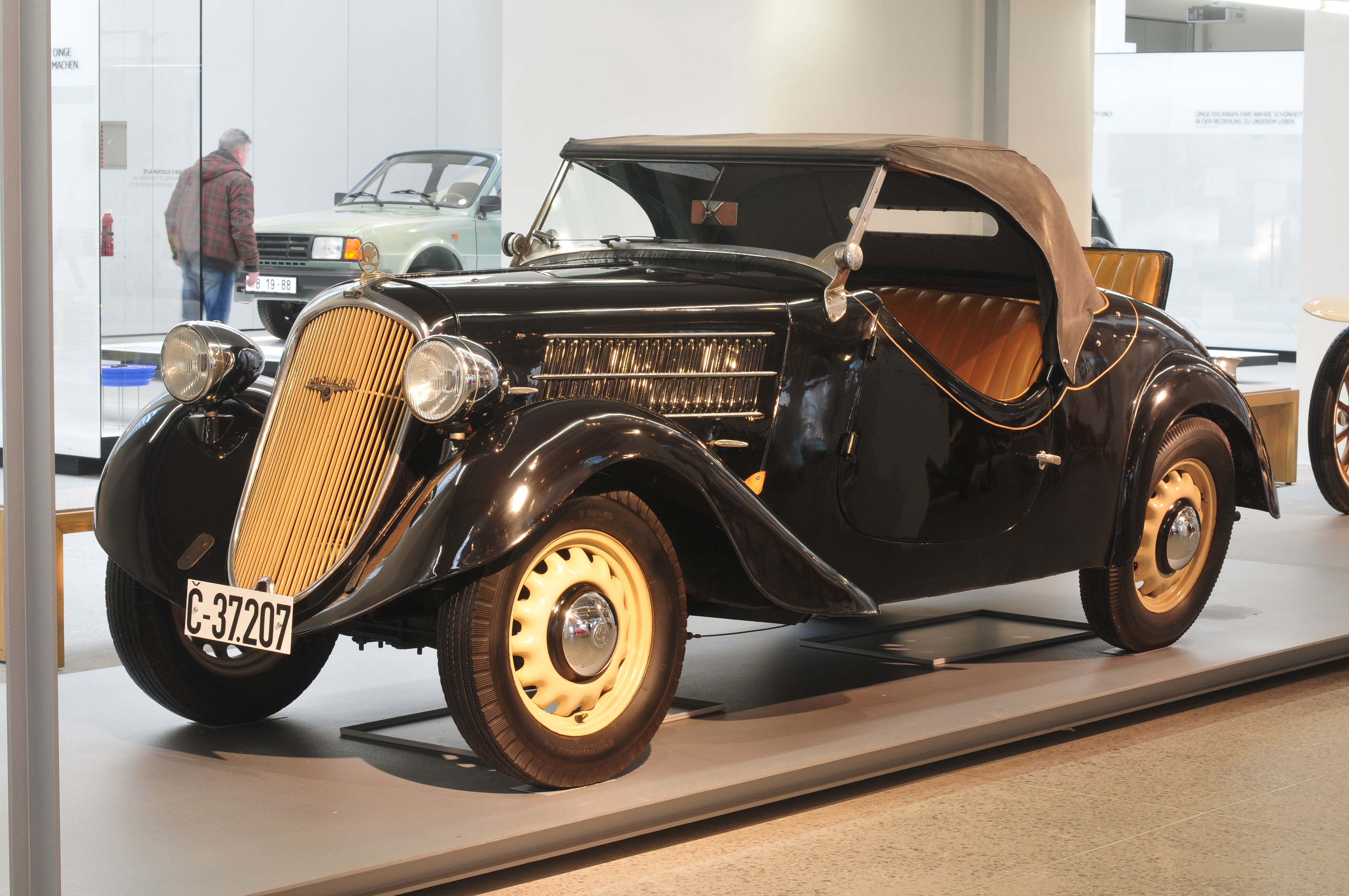 Fototermin Škoda Museum Mladá Boleslav 2013 Fototermin Škoda Muzeum 5. April 2013 in Mladá Boleslav This work is free and may be used by anyone for any purpose. If you wish to use this content, you do not need to request permission as long as you follow any licensing requirements mentioned on this page.